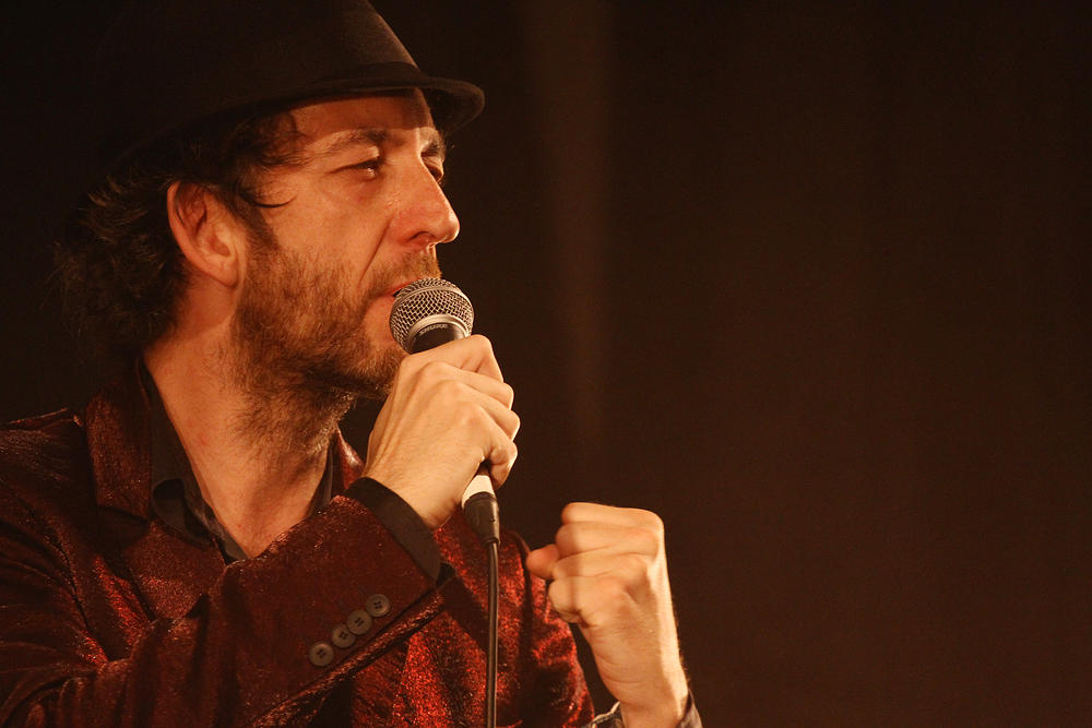 Arthur H au 24° Festival Chorus des Hauts de Seine à Châtillon